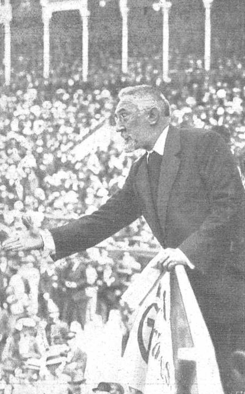 Los oradores, perorando.